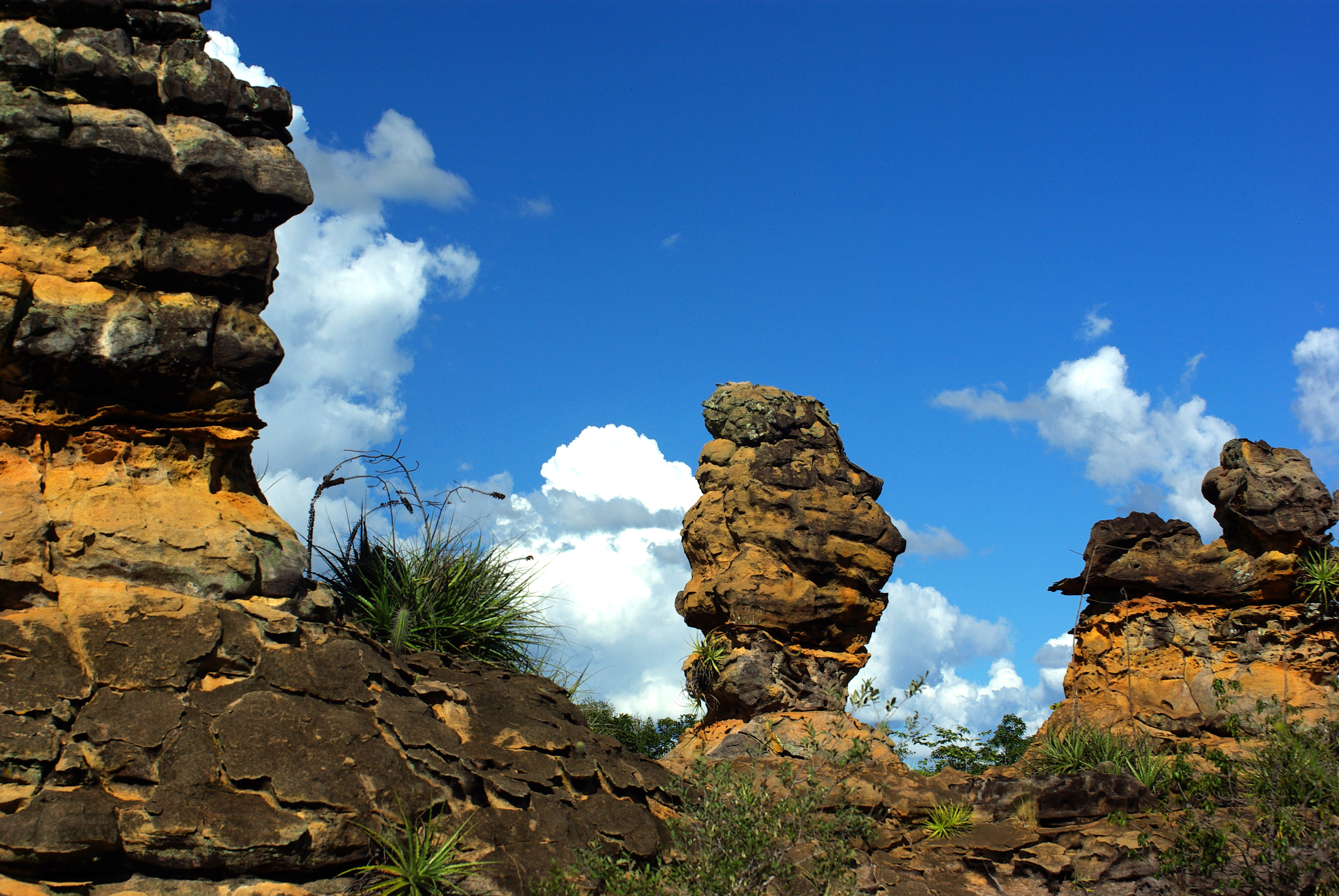 Parque Nacional de Sete Cidades - Piauí - Brasil